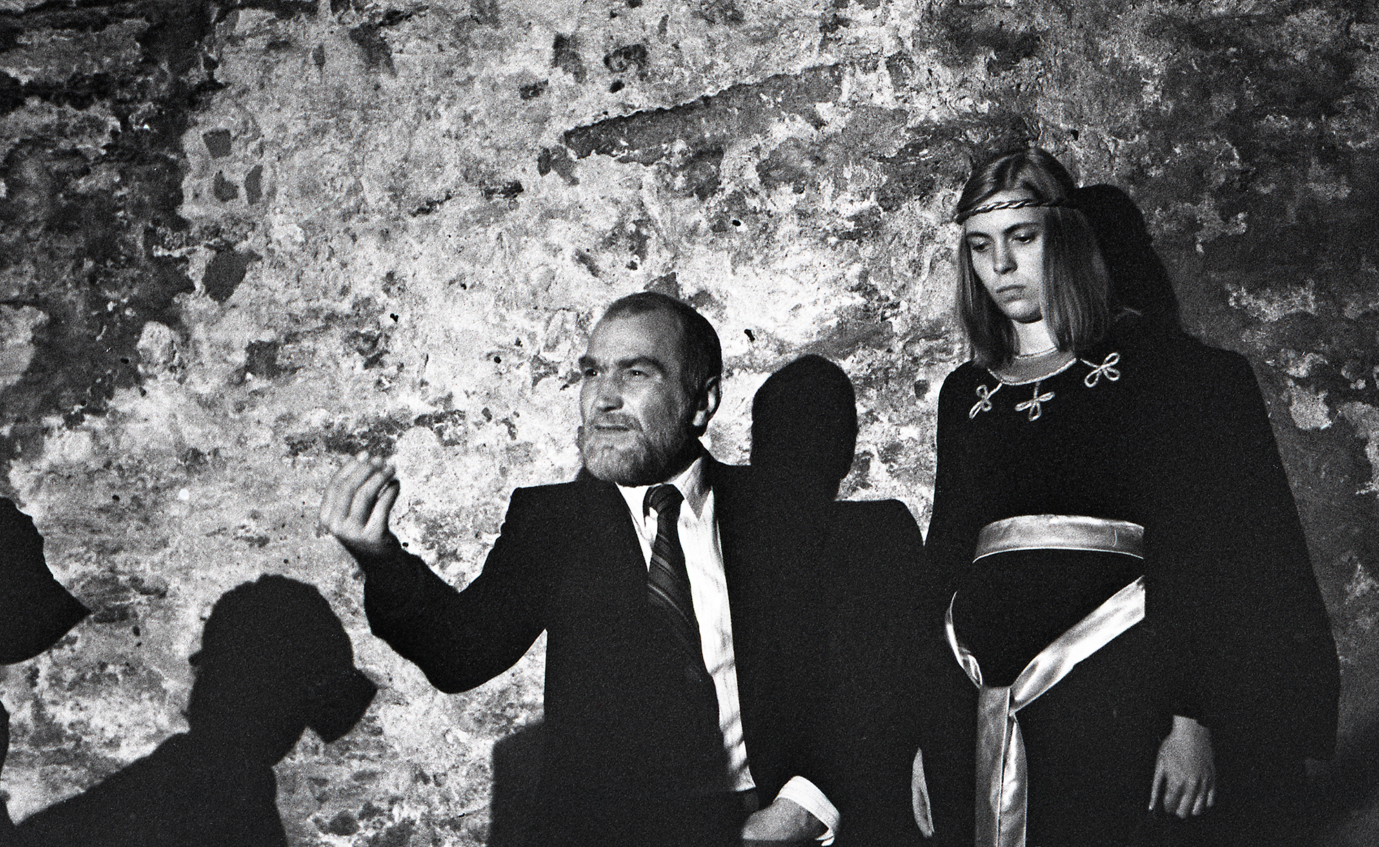 Mikk Mikiver ja Kiiri Tamm. XI lend 1980-1984 kursuse juhendaja Mikk Mikiver. “Heinrich IV", esiet. Kiek in de Kökis, 1983